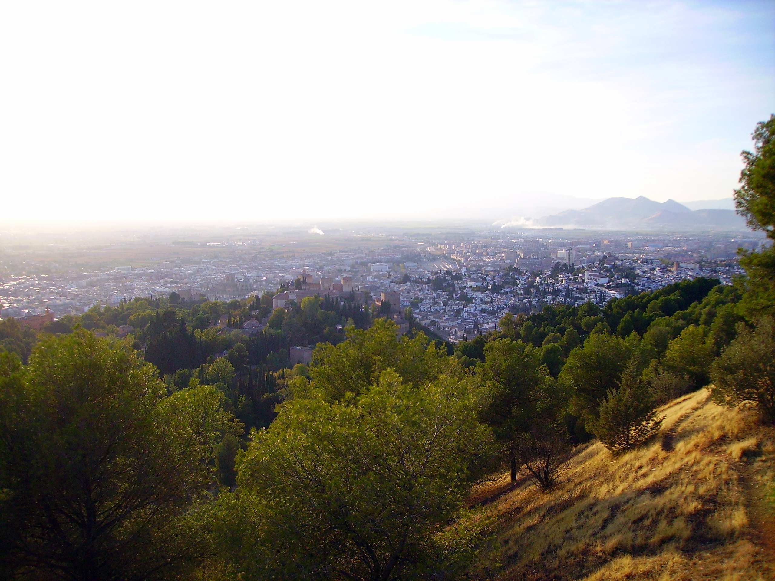 Granada from Alhambra Hill